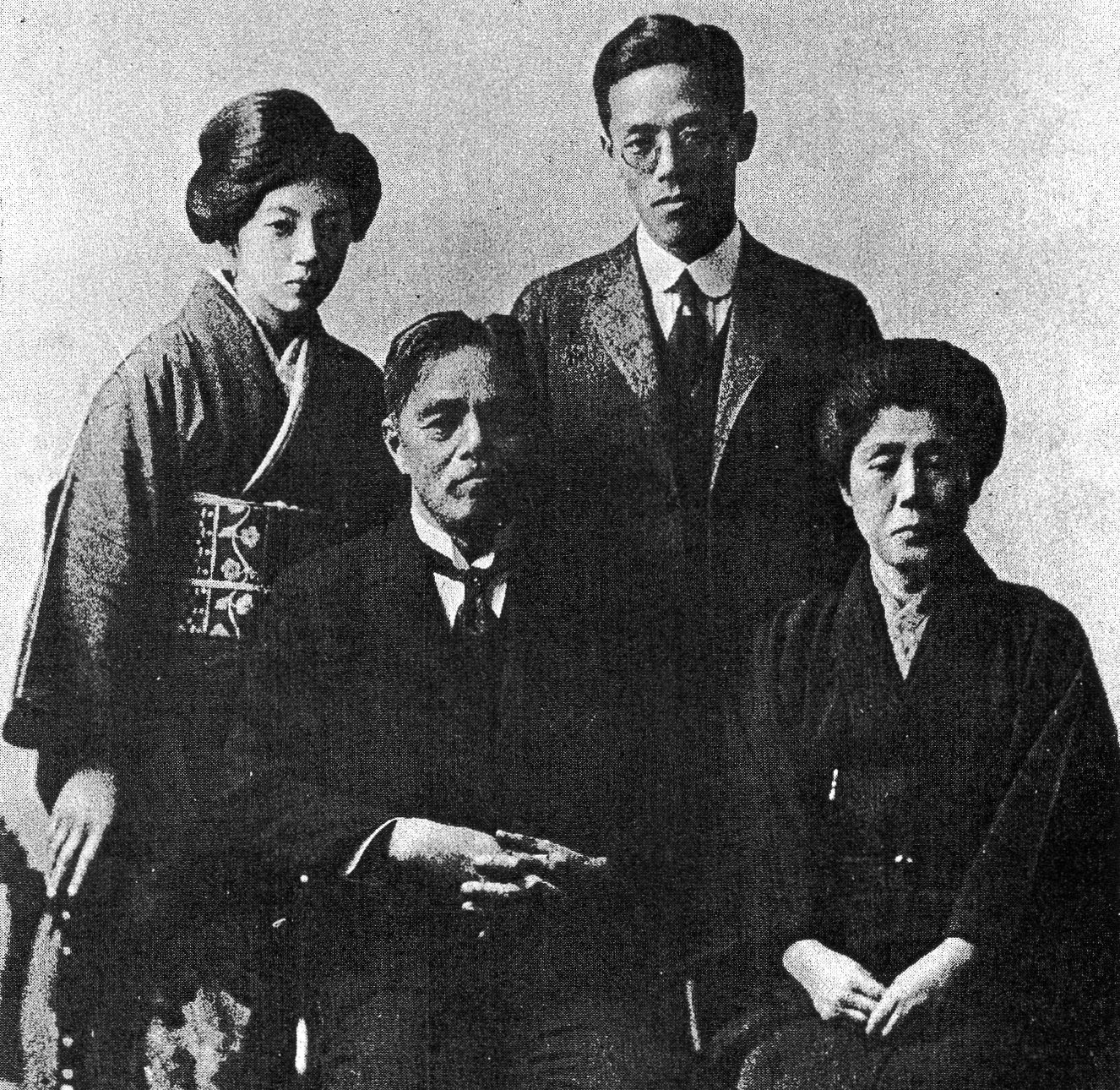 内村鑑三と妻静子、長男祐之とその妻美代子